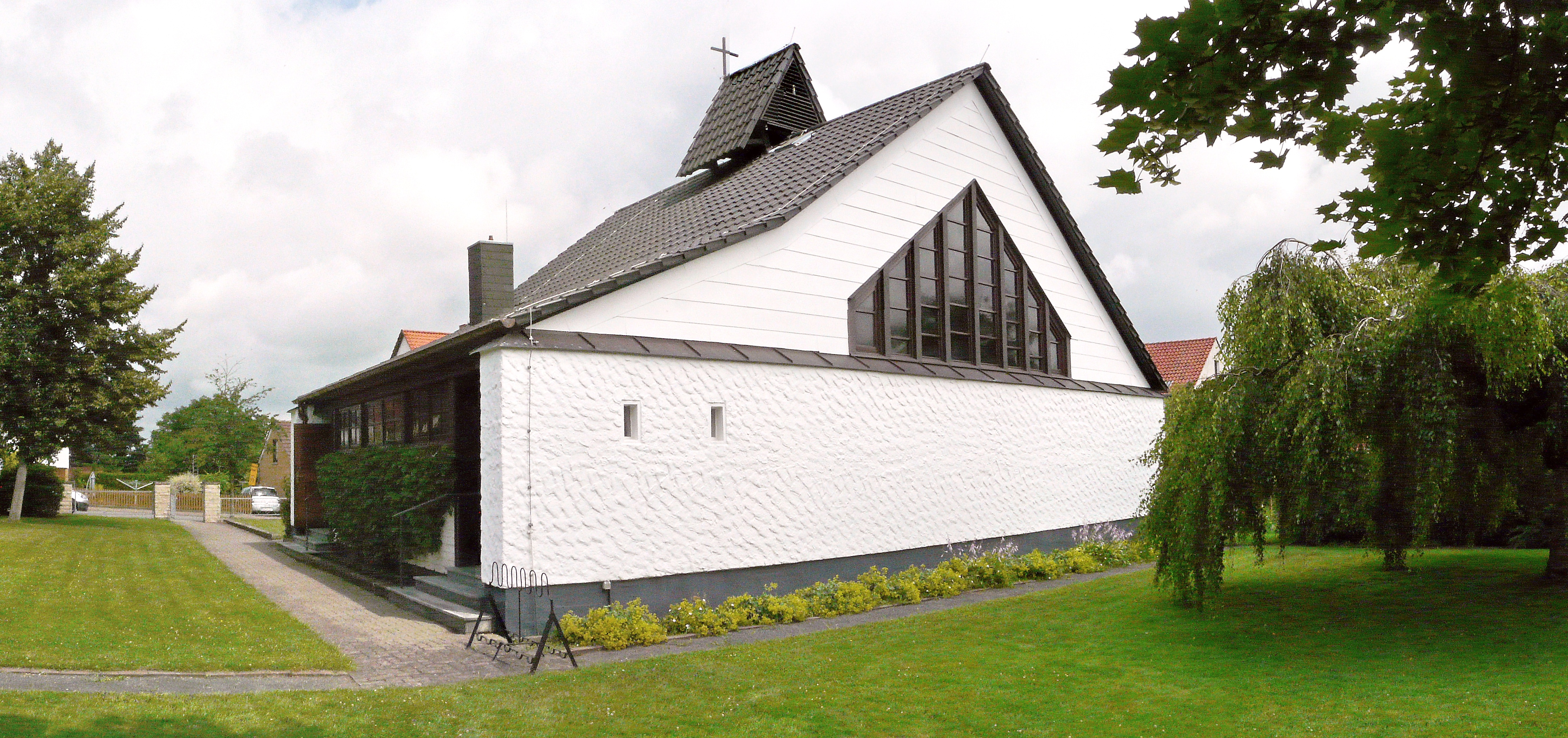 Die Pauluskirche in Bilshausen (Landkreis Göttingen), eine Diasporakapelle des Architekten Otto Bartning.